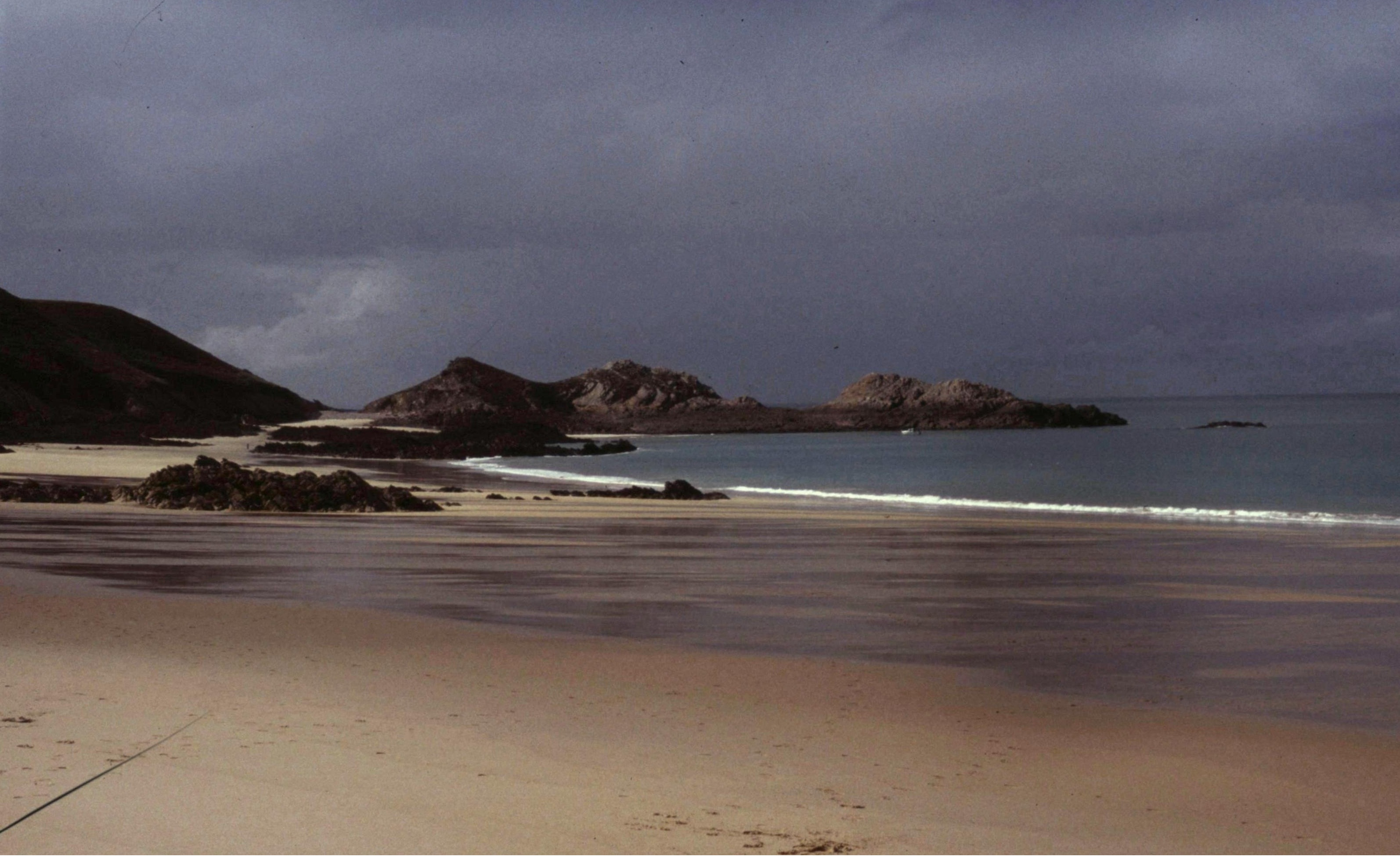 Cotes-D'Armor Erquy Plage